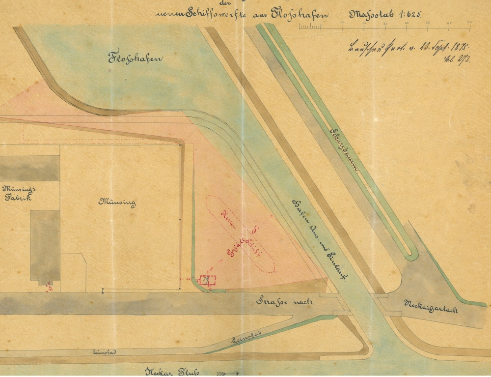 Lageplan von 1875 mit der neuen Werft an der Südseite der Einfahrt zum Floßhafen in Heilbronn, Kalistraße 29 u. U.